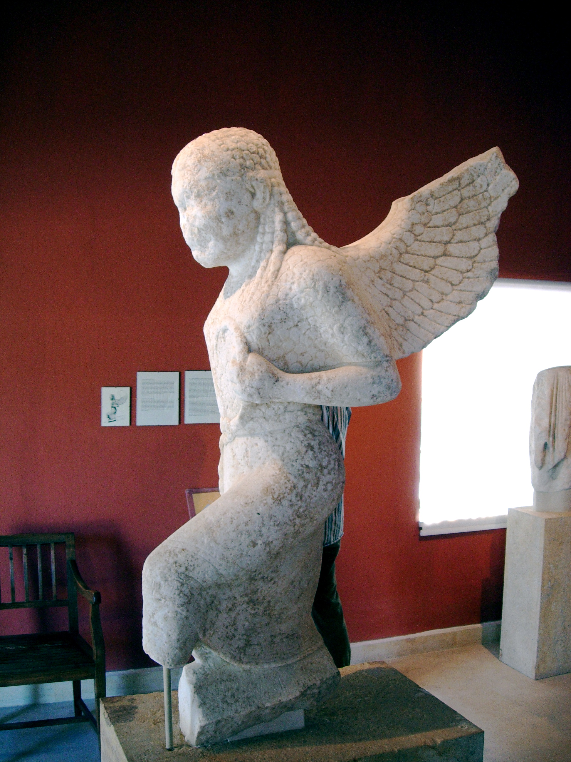 Gorgon statue, Paros